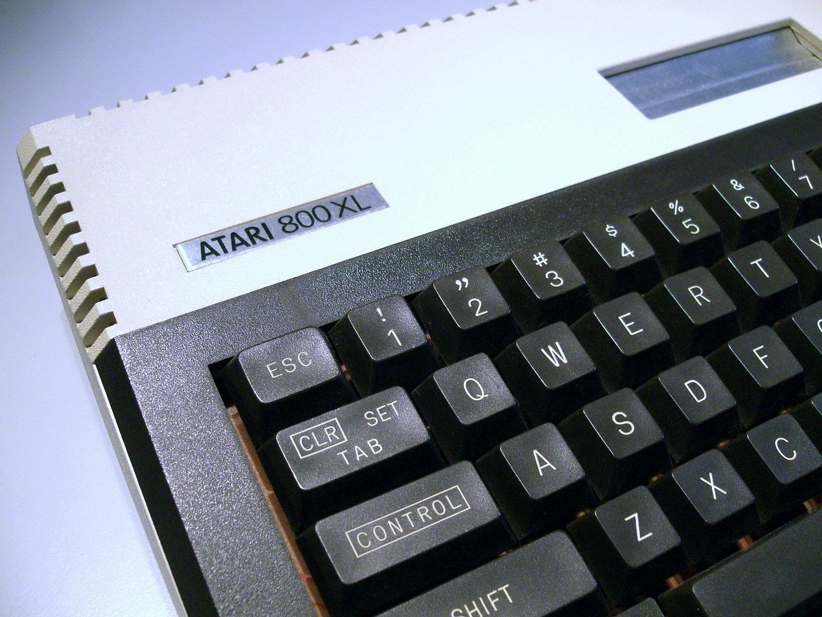 Atari 800XL Tastatur Links Nahaufnahme